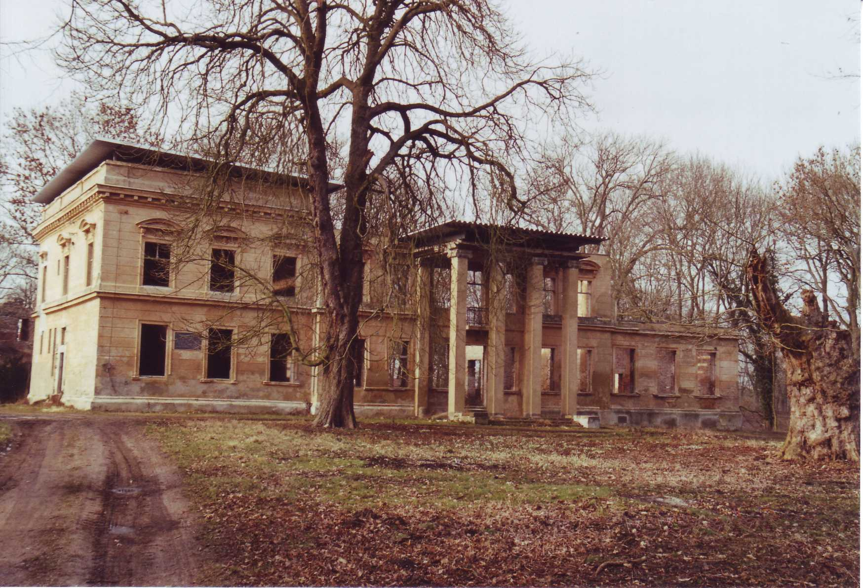 Ruine des Herrenhauses Haus Demmin